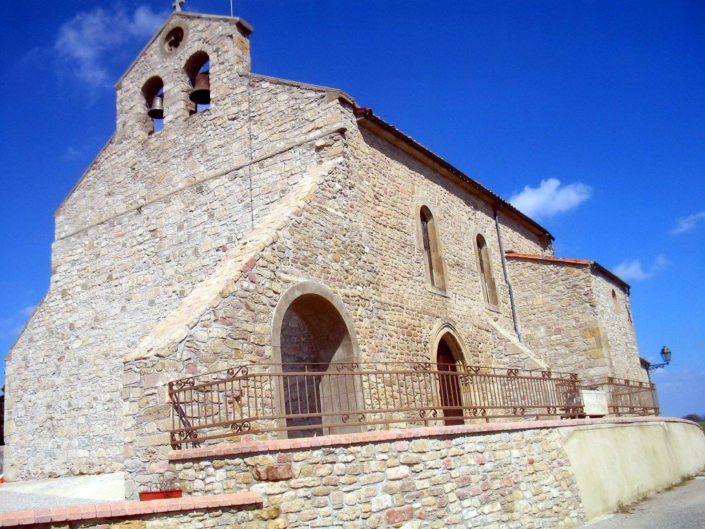 Eglise de Saint-Gaudéric.